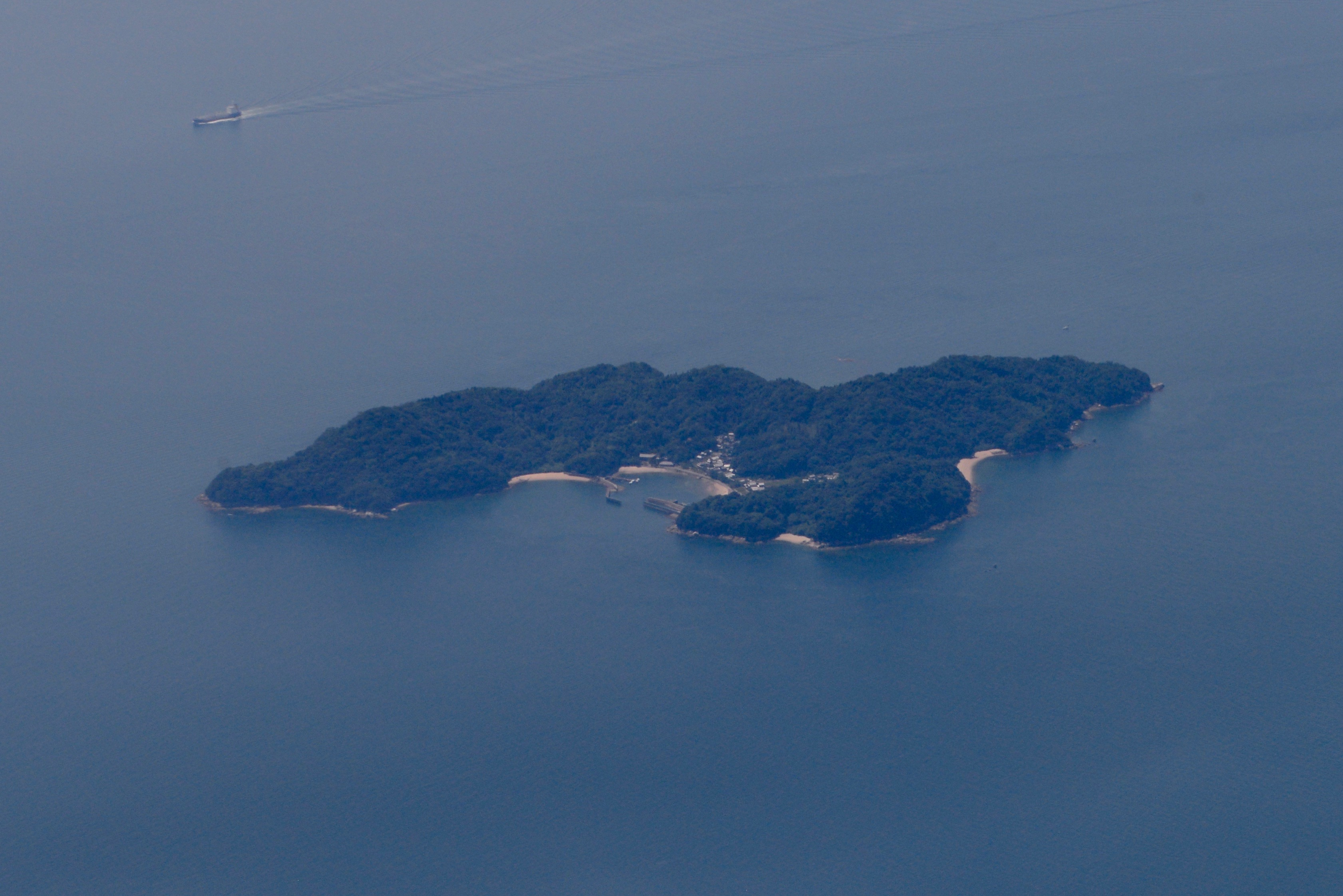 広島県呉市豊浜町斎島